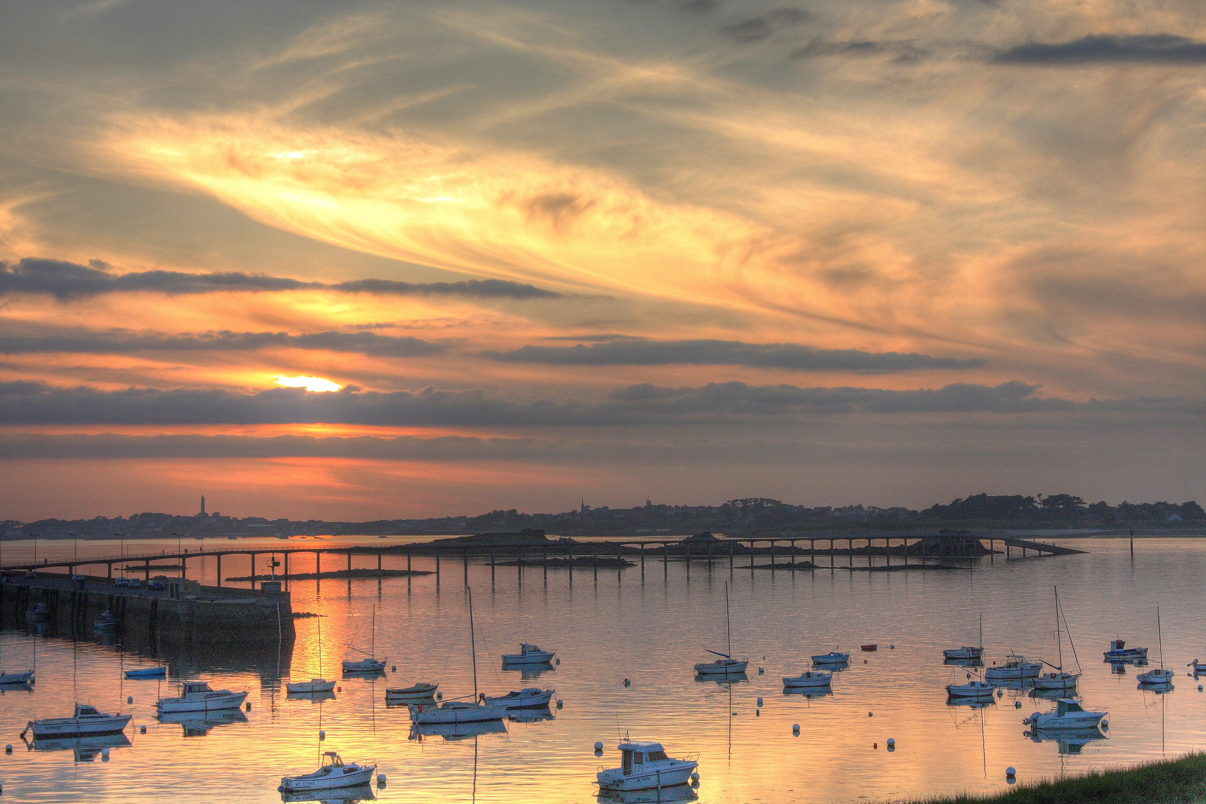 coucher de soleil sur l'ile de Batz vu de Roscoff